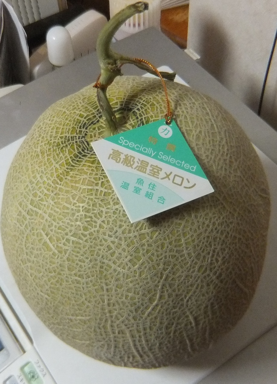 稲美メロン